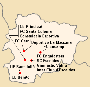 Répartition des clubs en Divisio 1A 1998-1999.